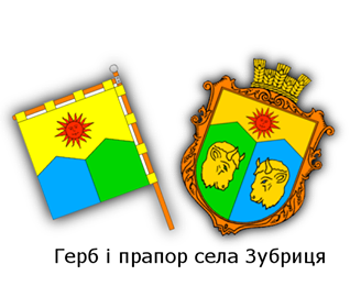 Герб і прапор села Зубриця